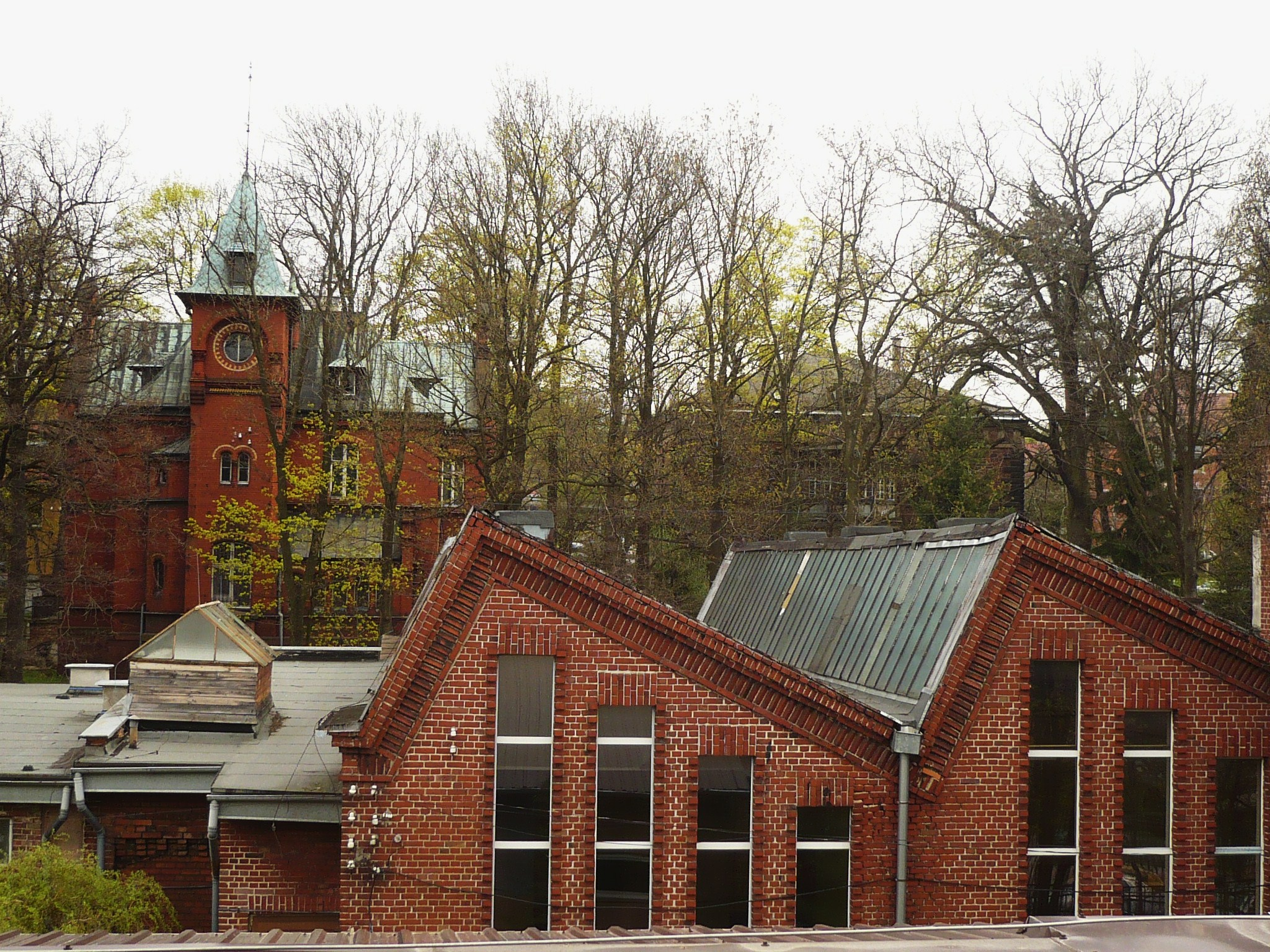 Drukarnia Klambta